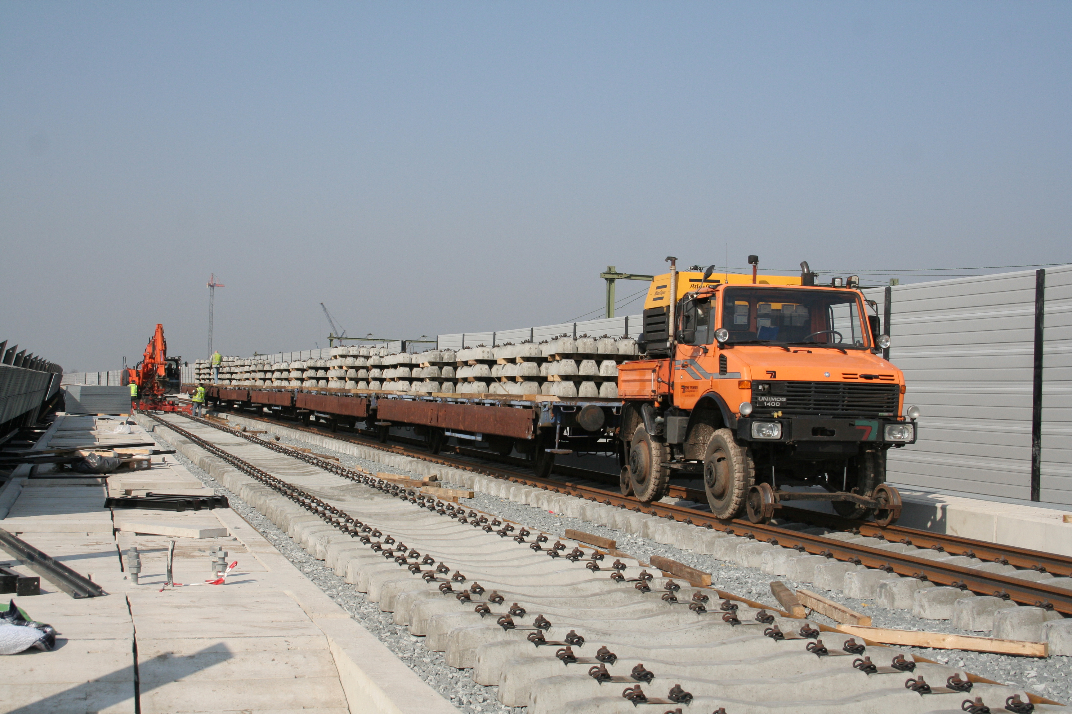 Unimog 1400 bezig met spoorwegwerkzaamheden te Utrecht Terwijde.